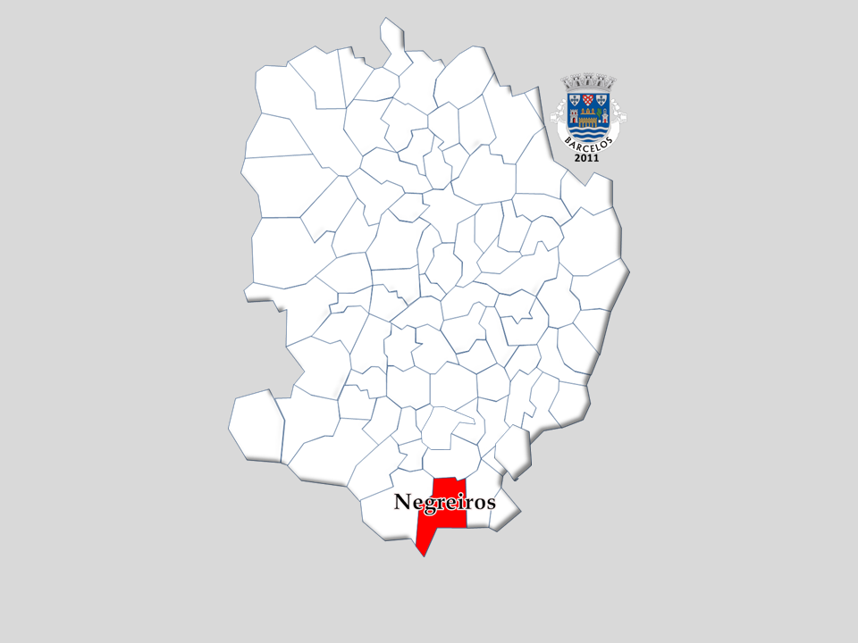 Cenos 1864/2011